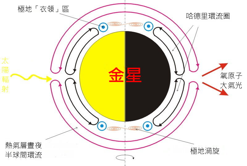 金星大氣層環流結構